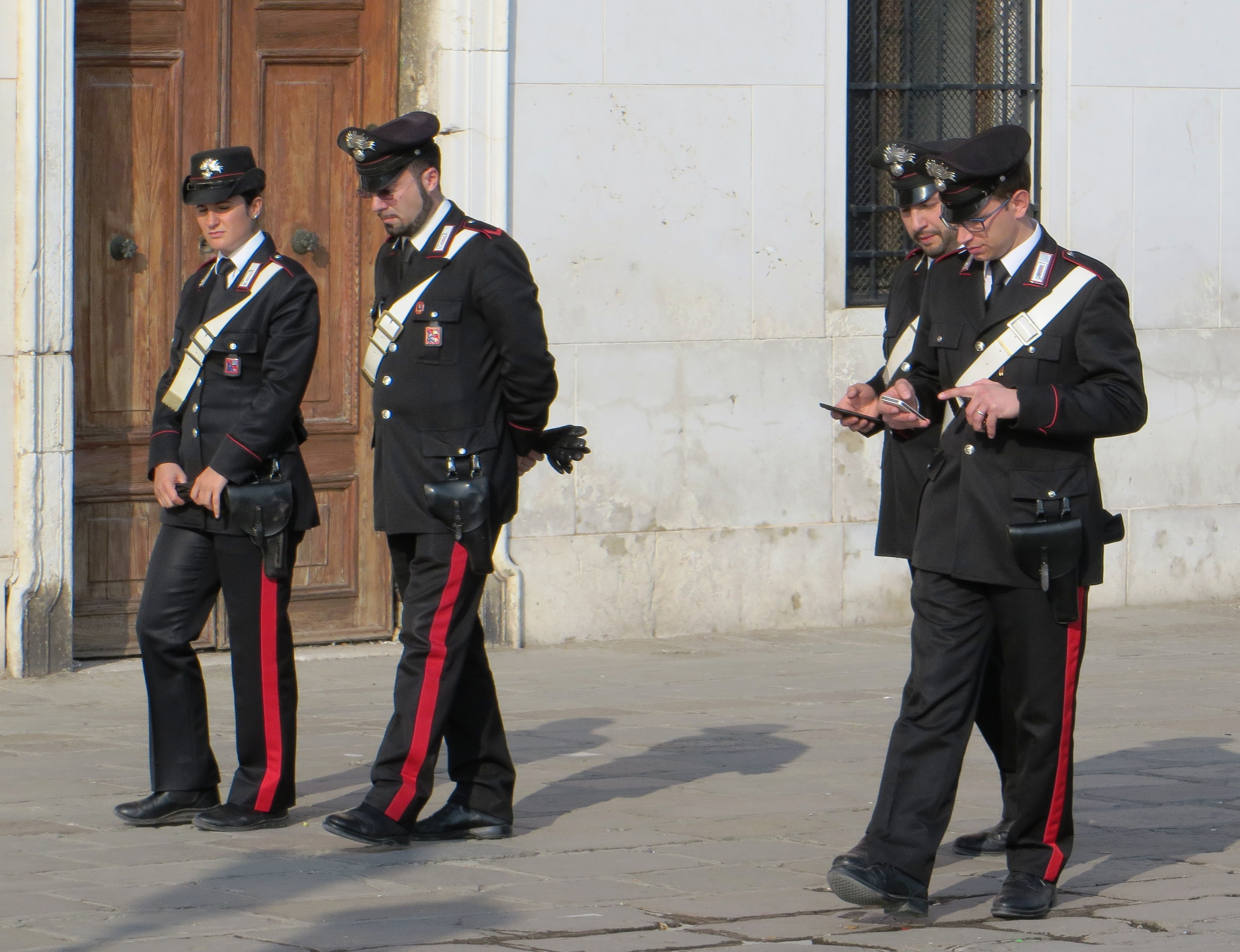 Carabinieri